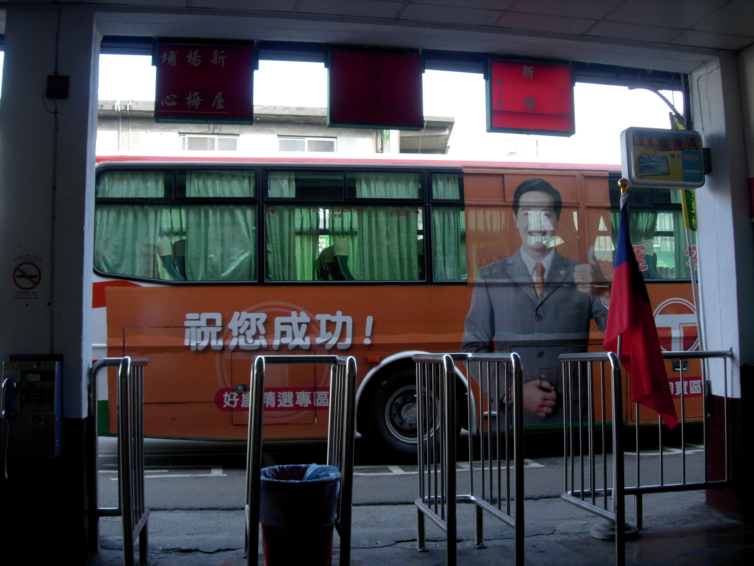 中文（台灣）: 新竹客運龍潭站月台